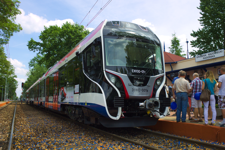 Elektryczny zespół trakcyjny EN100-01 na stacji Grodzisk Mazowiecki Radońska podczas prezentacji.